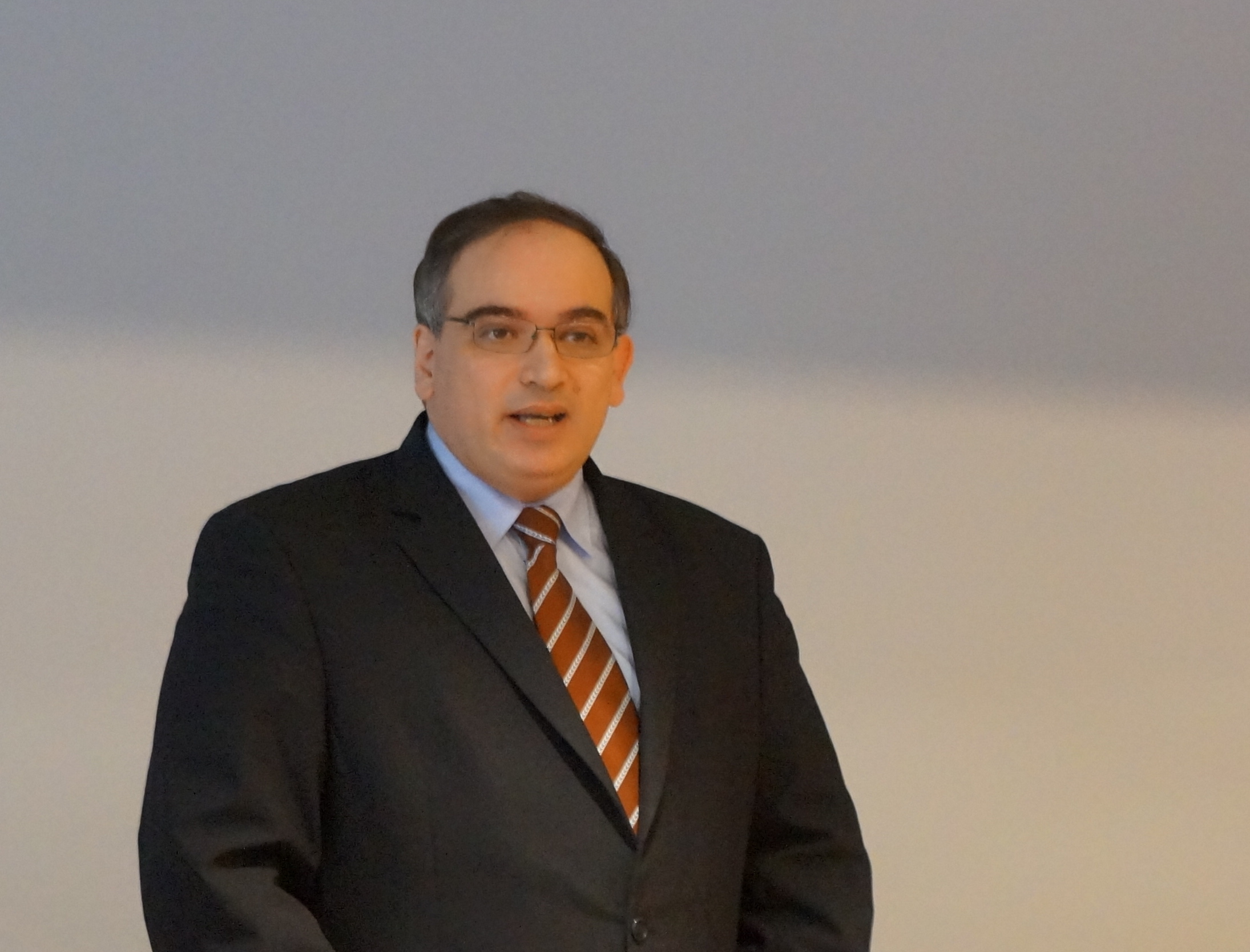 Luigi Miraglia, presentazione della rivista "Mantinea, dies facultatis FLCC 2016.